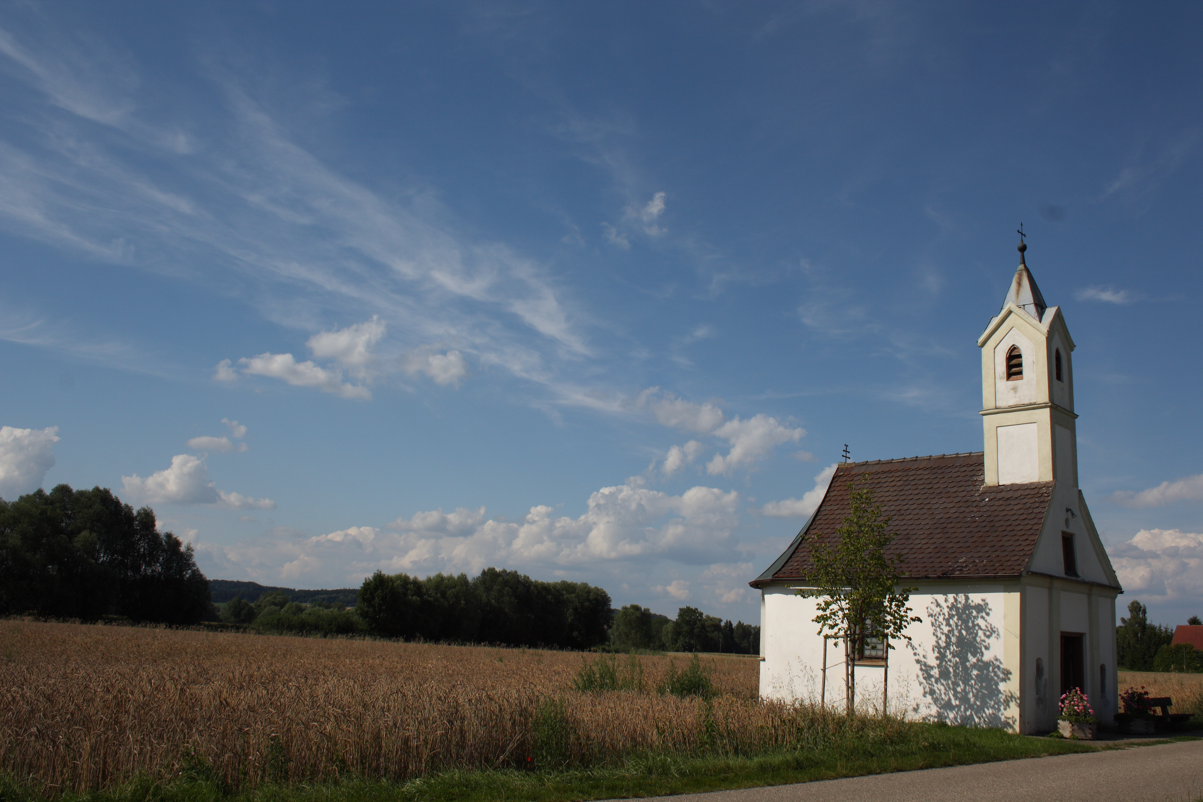 Katholische Kapelle St. Wendelin in Rettingen, einem Ortsteil von Tapfheim im Landkreis Donau-Ries (Bayern)